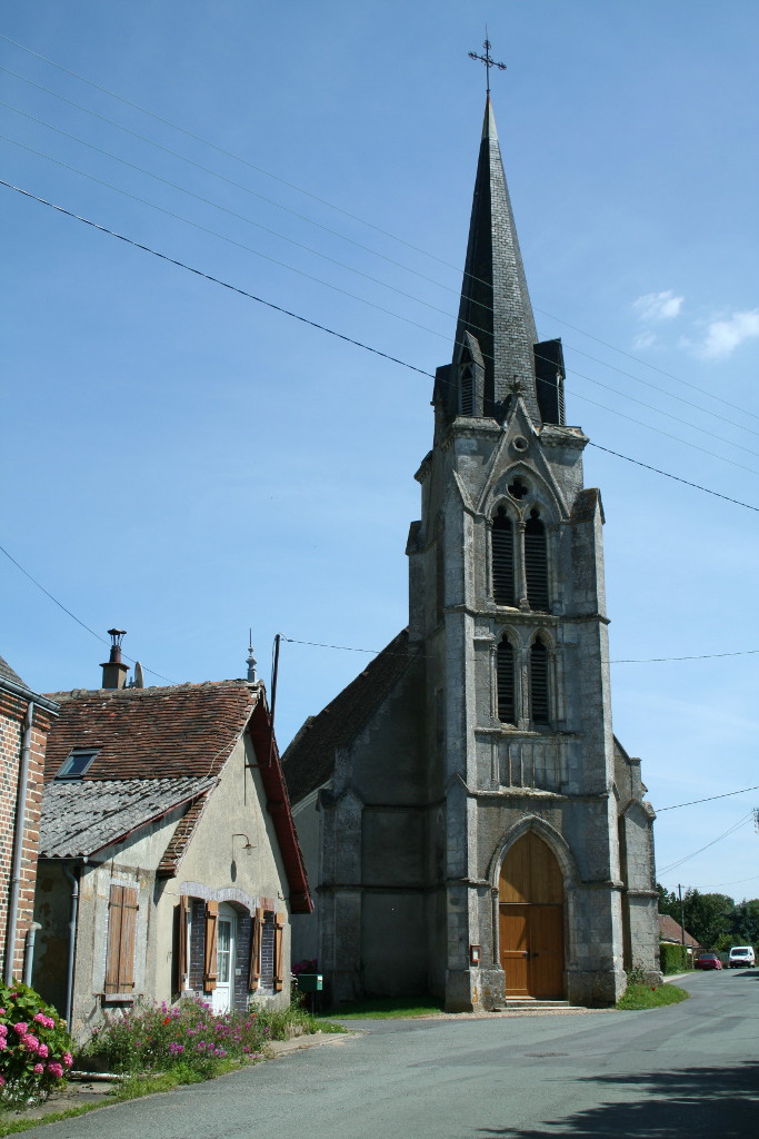 C'est la magnifique vue de la table d'orientation.